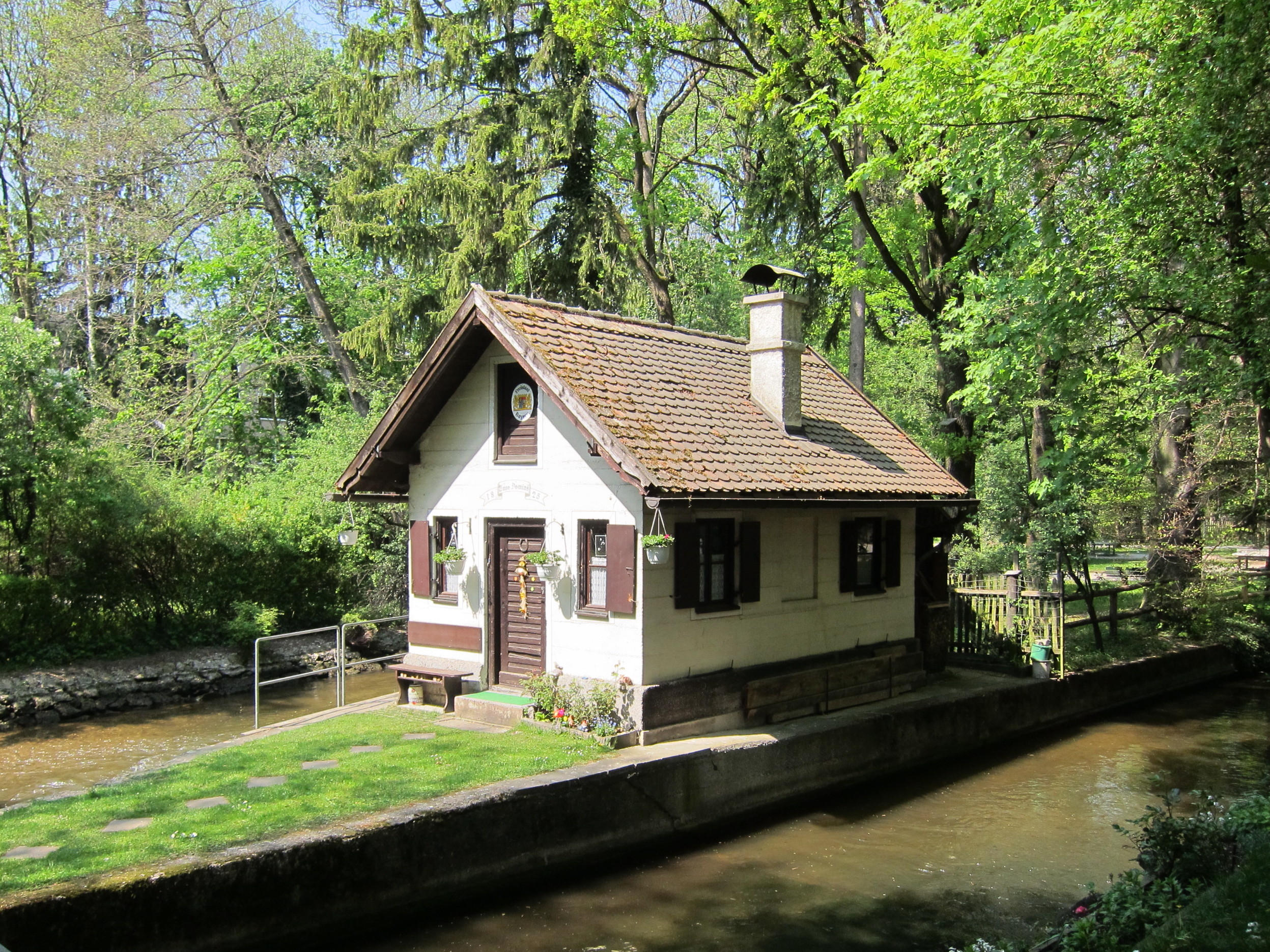 Schleusen- bzw. Kanalwärterhäuschen, kleiner Satteldachbau, bez. 1825; zwischen Würm und Nymphenburger Kanal, bei Manzingerweg 2 in München-Pasing.